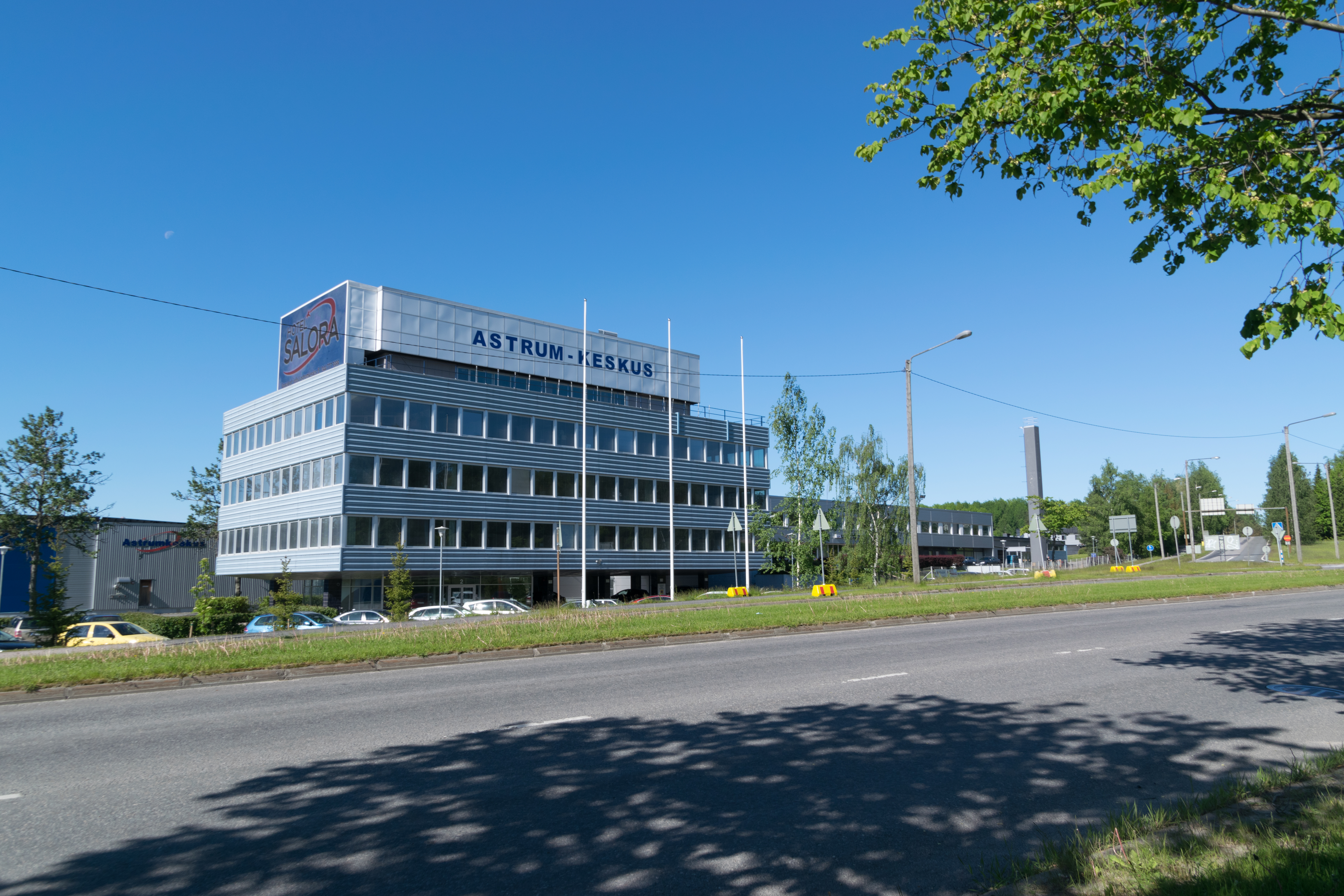 Astrum keskus